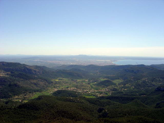 Puigpunyent, amb Palma al fons, vist des del Galatzó. Mallorca.